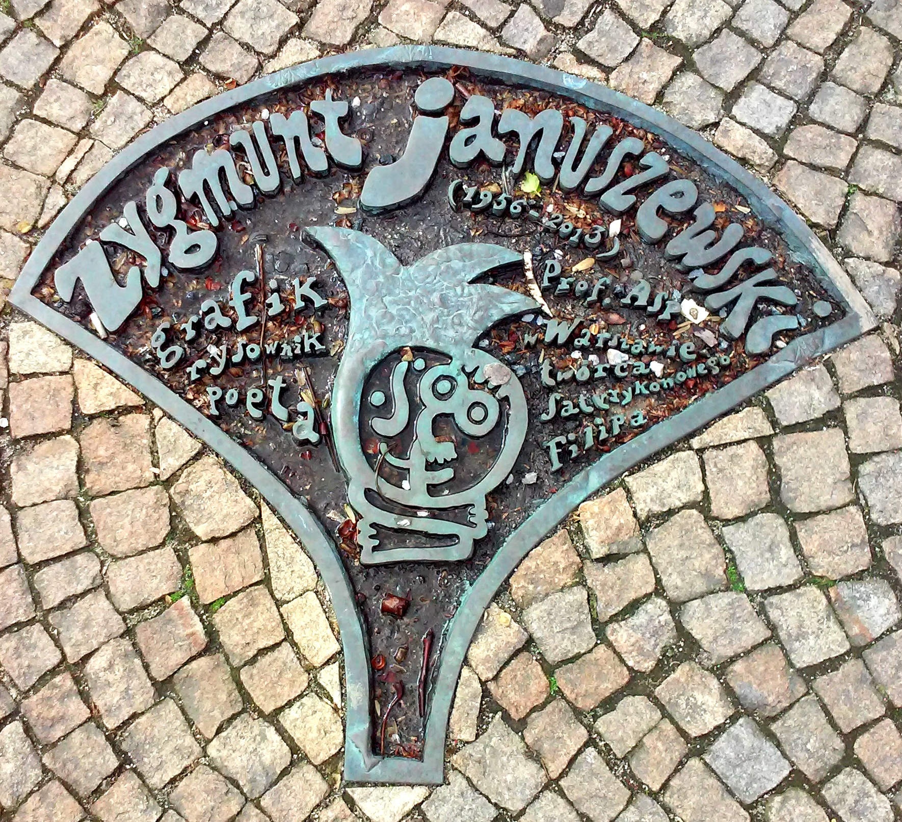 Legnica, Aleja Gwiazd Satyrykonu, tablica pamiątkowa - Zygmunt Januszewski.